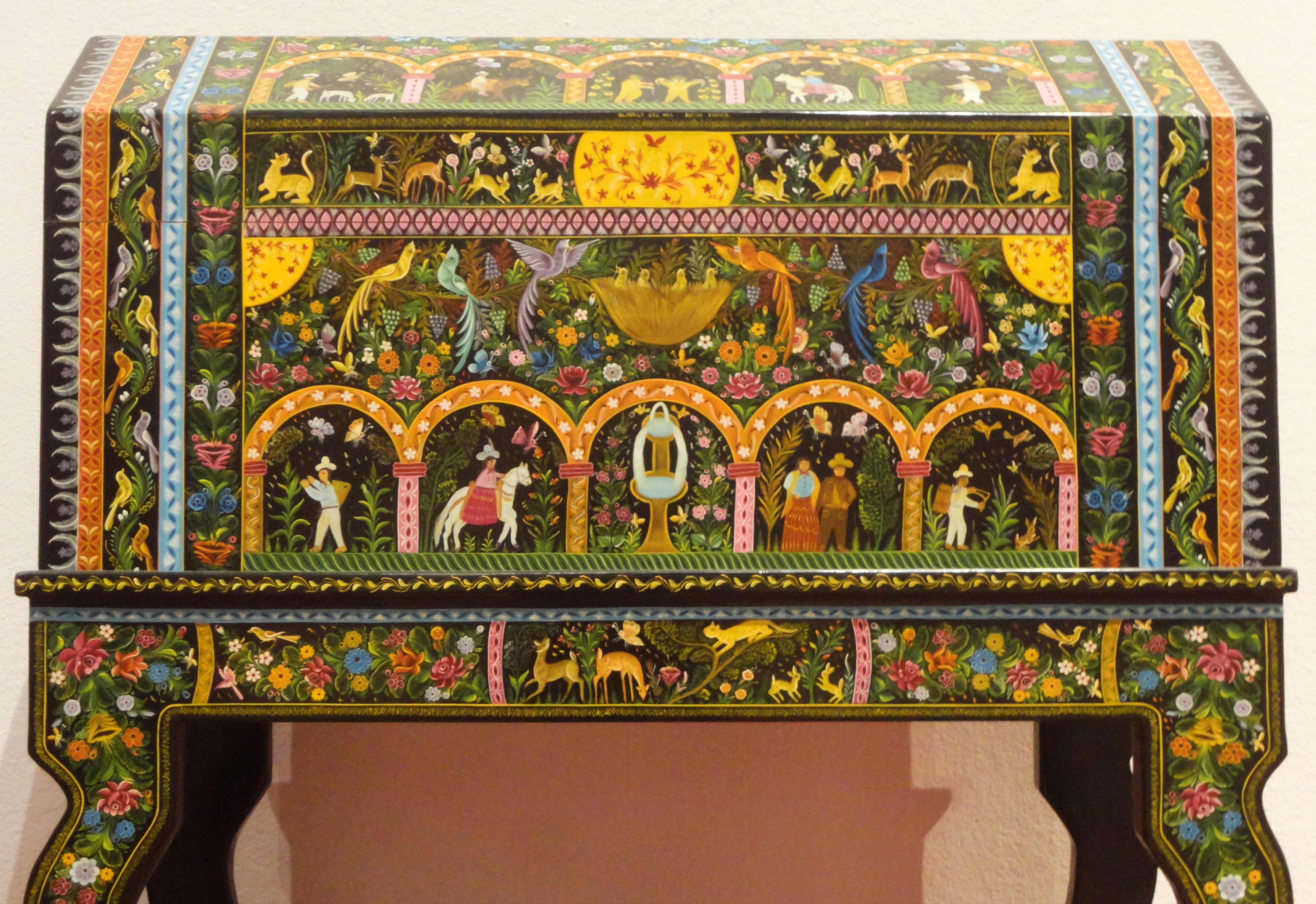 Baúl con base de Olinalá, Guerrero, México. Madera tallada, ensamblada, laqueada, con hoja de oro y decorada al pincel.